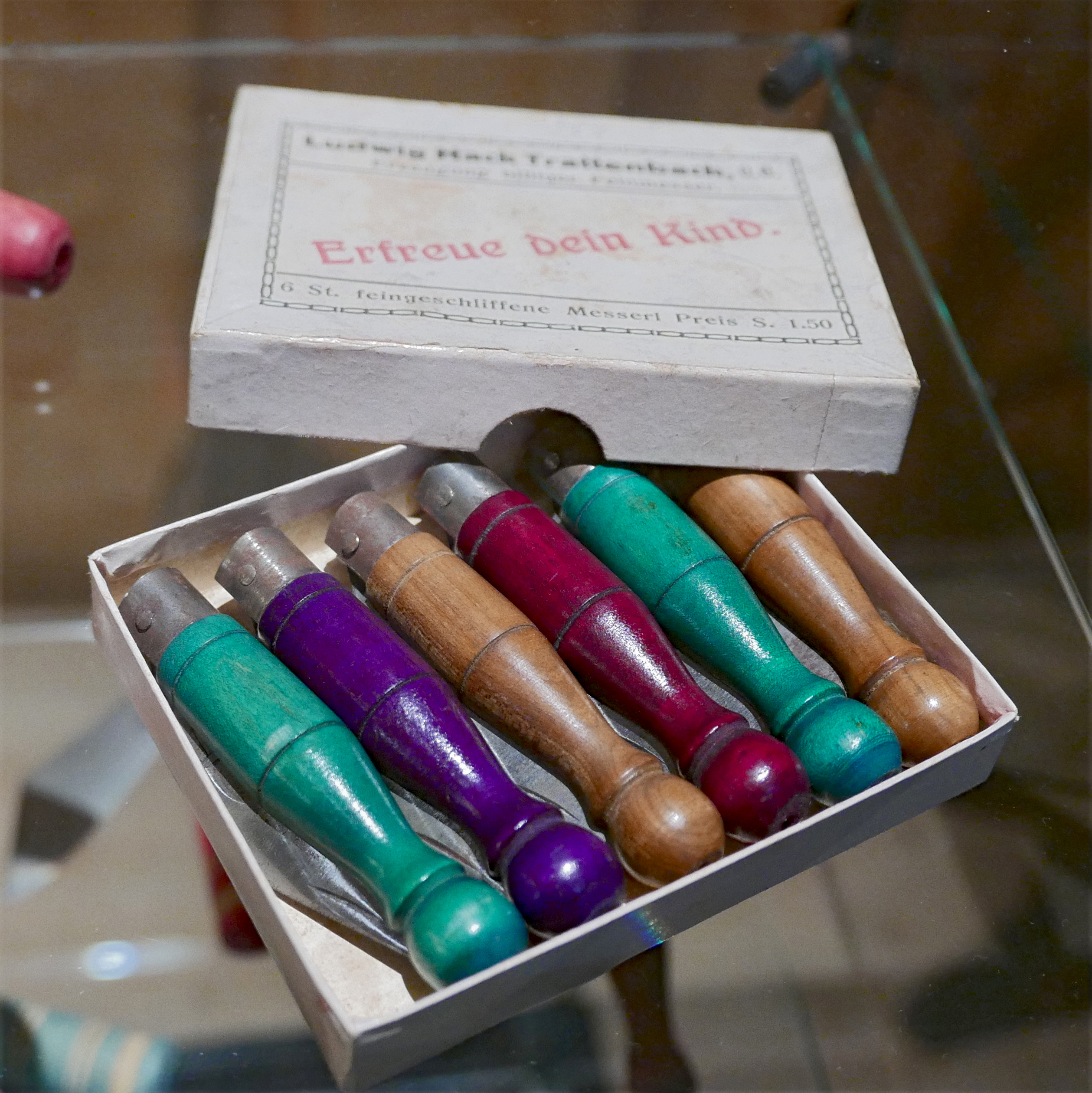 Museum in der Wegscheid : Alte Kindertaschenfeitel